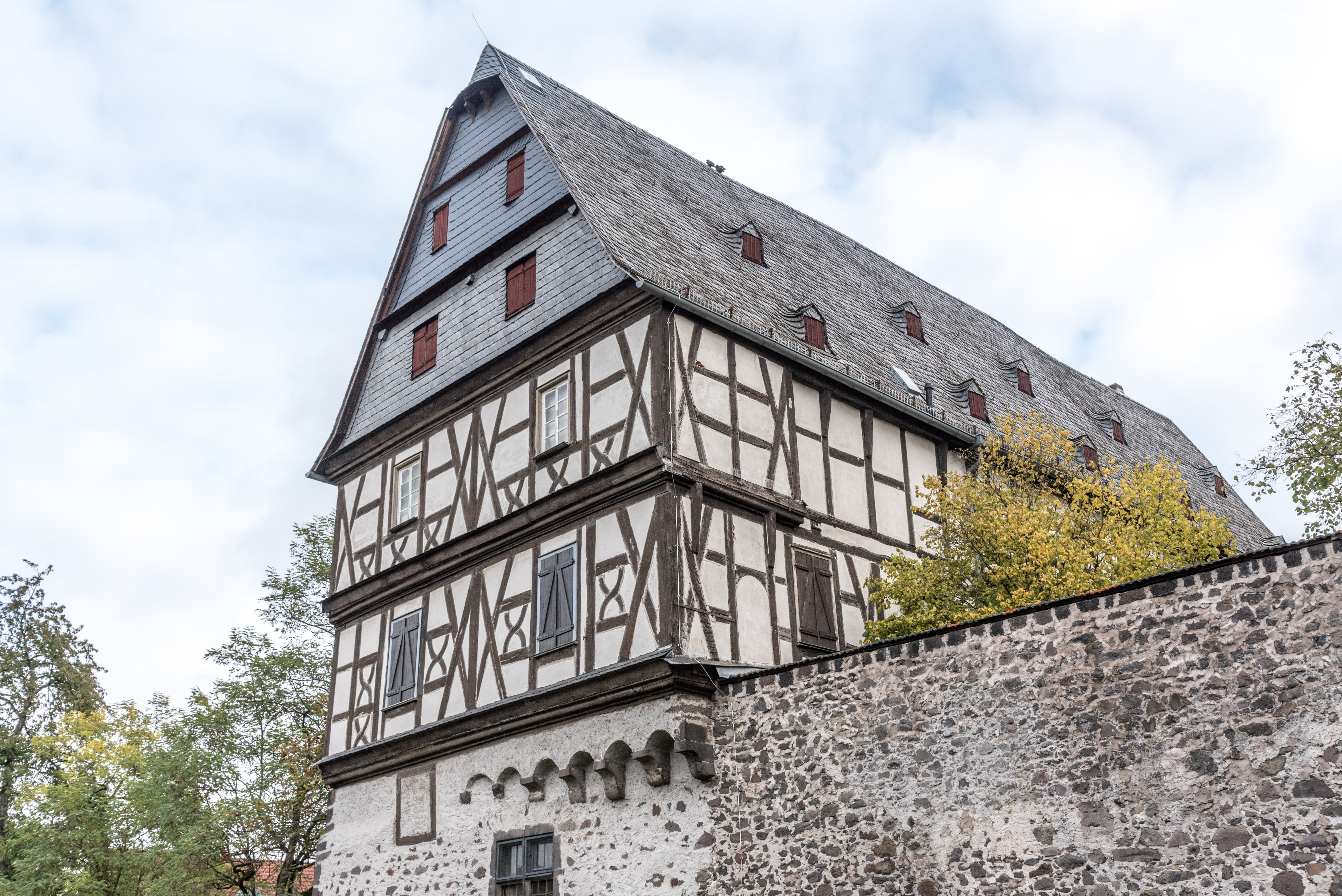 Grünberg, Rosengasse 8, Nordseite